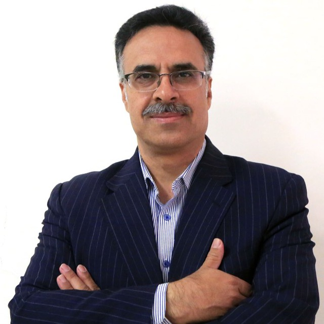 استاد تمام دانشگاه تهران